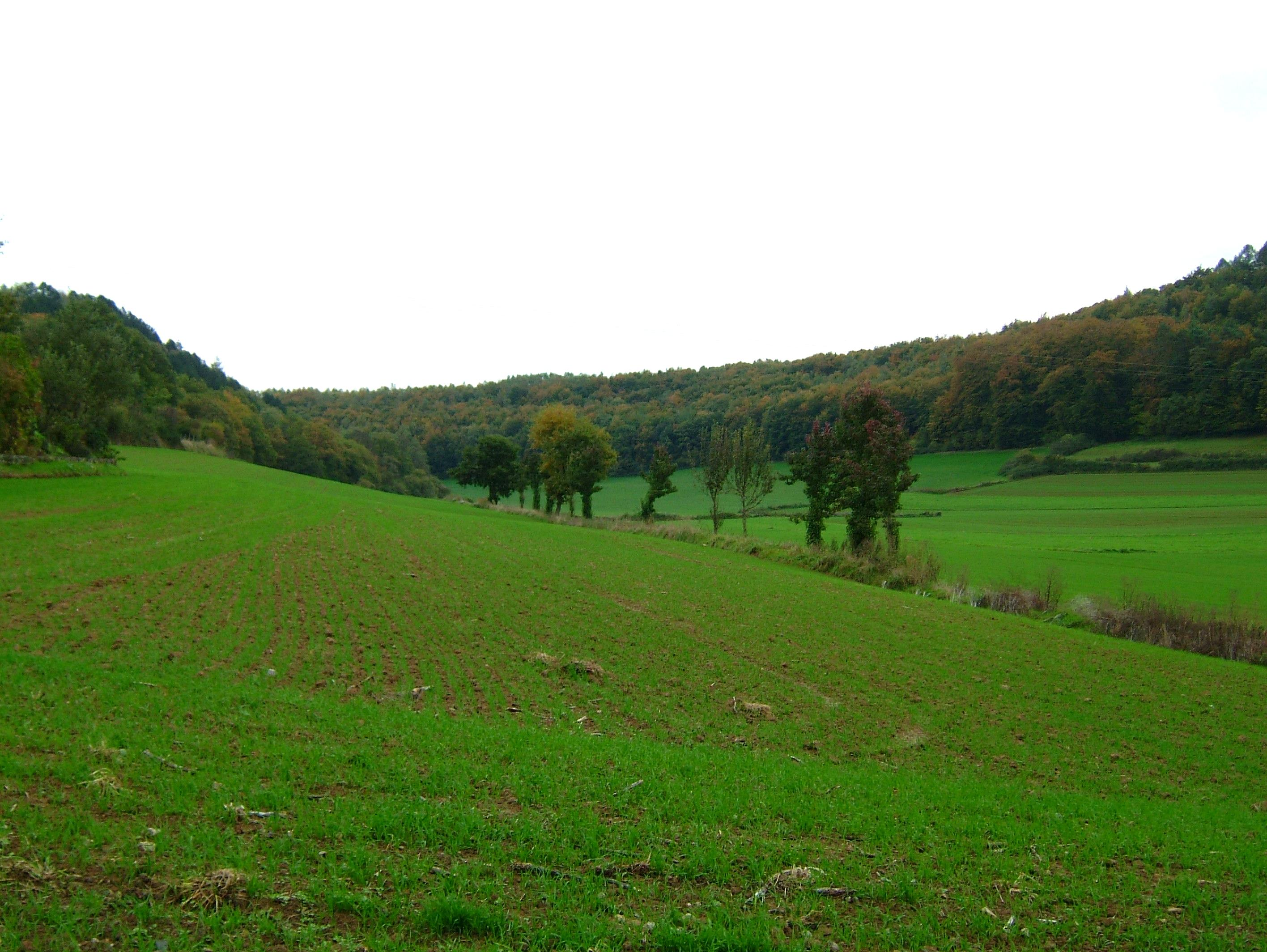 Duelebierg an der Gemeng Keel